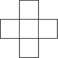 中國傳統棋類之一